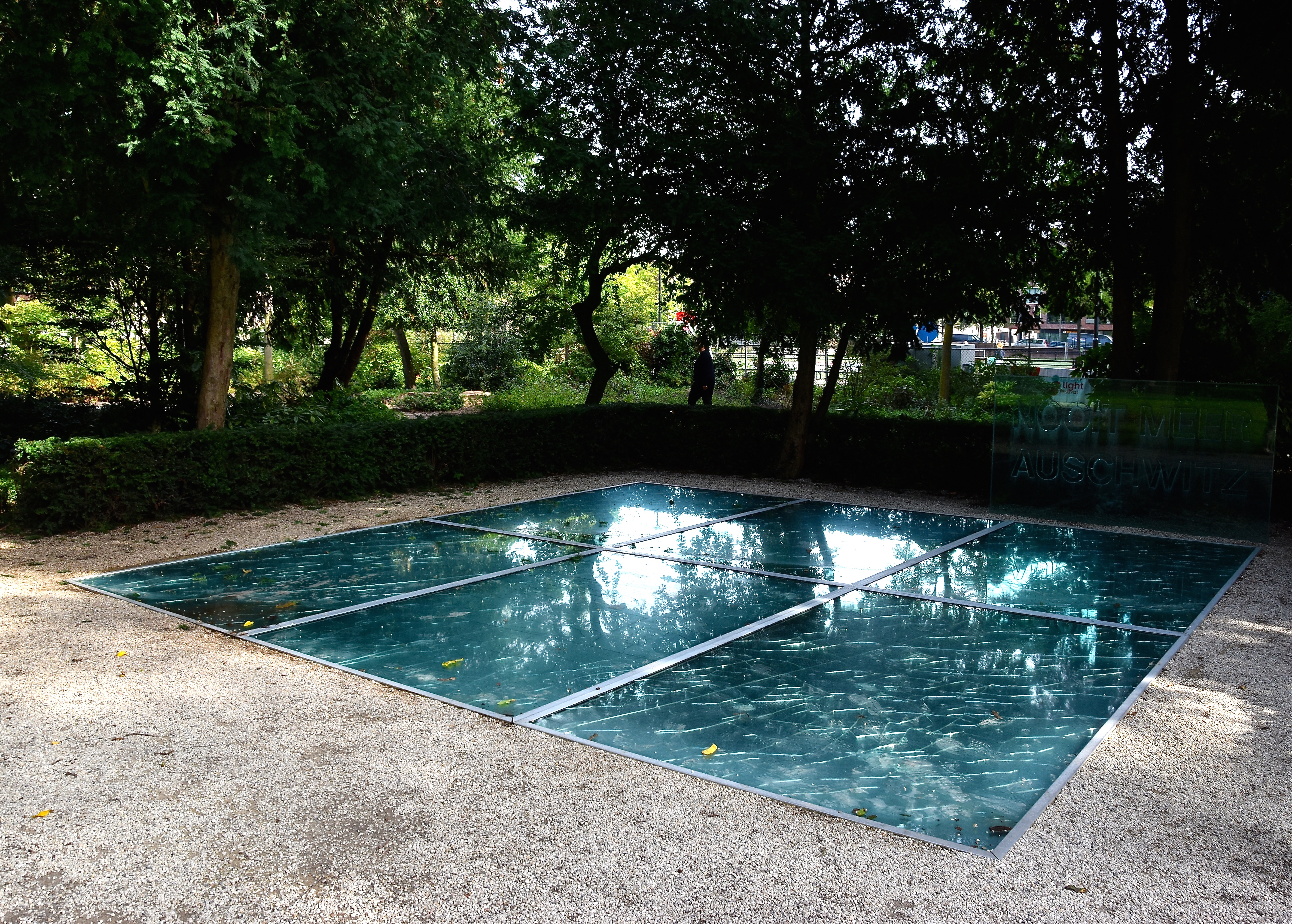 Een herdenkingsmonument ter nagedachtenis aan de 102.000 omgekomen Nederlandse Joden in het concentratiekamp Auschwitz. Het monument is in 1977 ontworpen door schrijver en beeldend kunstenaar Jan Wolkers (1925-2007). Het monument is opgebouwd uit gebroken spiegels en het kent het opschrift 'Nooit meer Auschwitz'. In de spiegels reflecteert de lucht. Volgens Wolkers symboliseren de gebroken spiegels dat de hemel na Auschwitz nooit meer ongeschonden is: "De hemel blijft voorgoed geschonden. Het is een godsgruwelijke aanslag op alles waar een mens voor staat". Bron: Er zijn overigens plannen voor een nieuw monument: This monument was created (1977) by Dutch writer and artist Jan Wolkers, in memory of the 102.000 Dutch-Jewish victims of Auschwitz. The monument is made up of broken mirrors and can be found in the Wertheimpark. According to Wolkers, the mirrors represent the thought that “heaven is no longer unbroken since Auschwitz”.